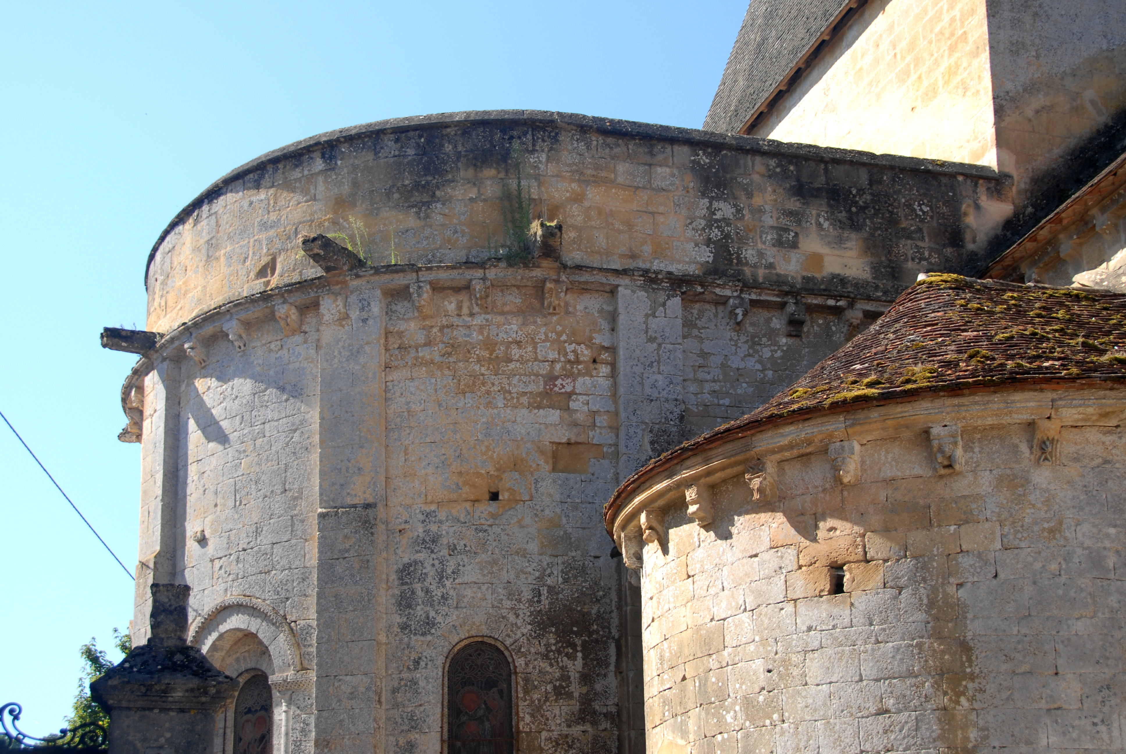 Cadouin, Abteikirche, Chorattika